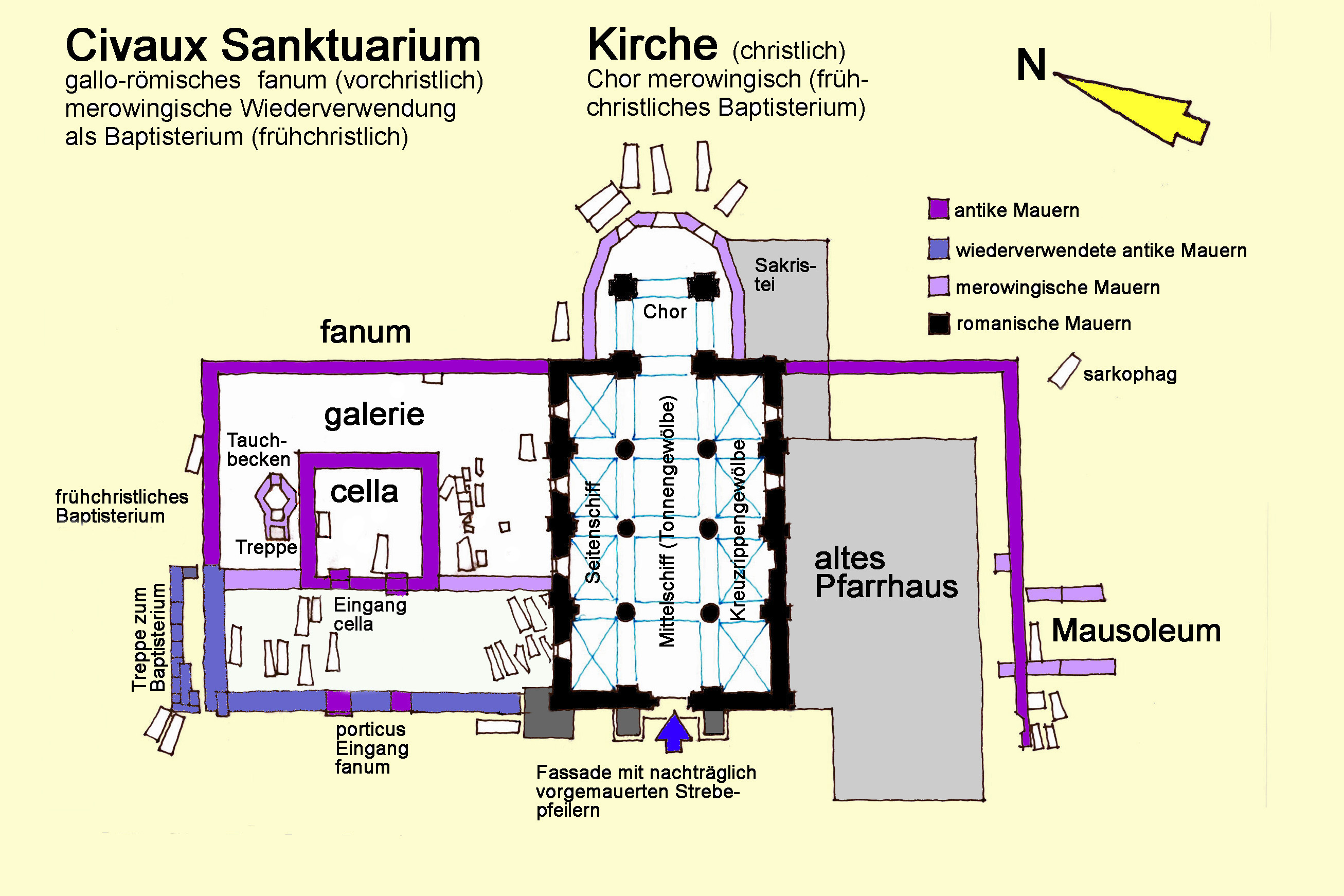 Civaux,Sanktuarium,Kirche,Grundris, Handskizze